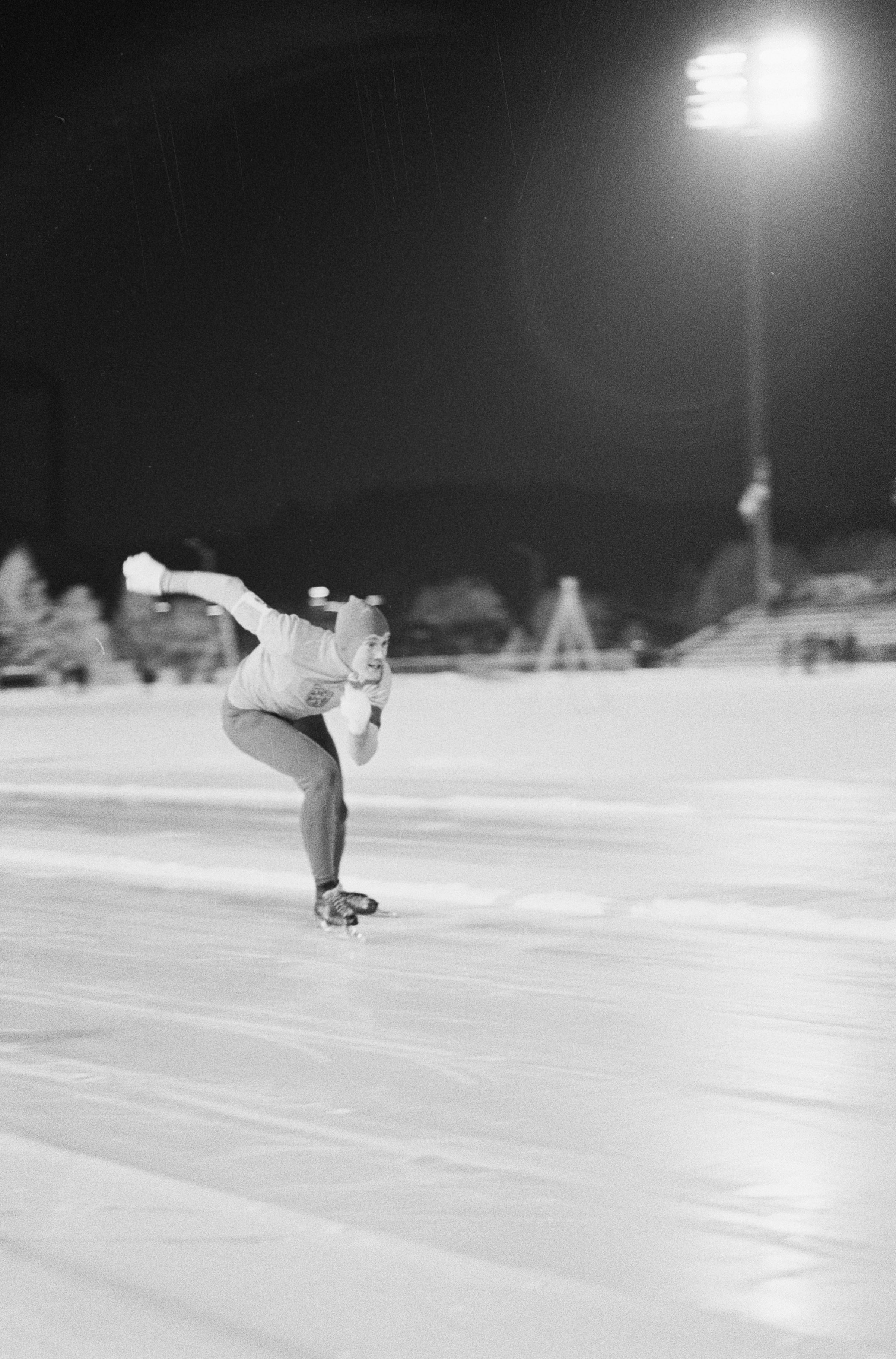 Collectie / Archief : Fotocollectie Anefo Reportage / Serie : [ onbekend ] Beschrijving : Europese Schaatskampioenschappen te Lathi, Finland, Matuschewitsch op 5000 meter Datum : 29 januari 1967 Locatie : Finland Trefwoorden : SCHAATSKAMPIOENSCHAPPEN Fotograaf : Kroon, Ron / Anefo Auteursrechthebbende : Nationaal Archief Materiaalsoort : Negatief (zwart/wit) Nummer archiefinventaris : bekijk toegang 2.24.01.05 Bestanddeelnummer : 920-0267